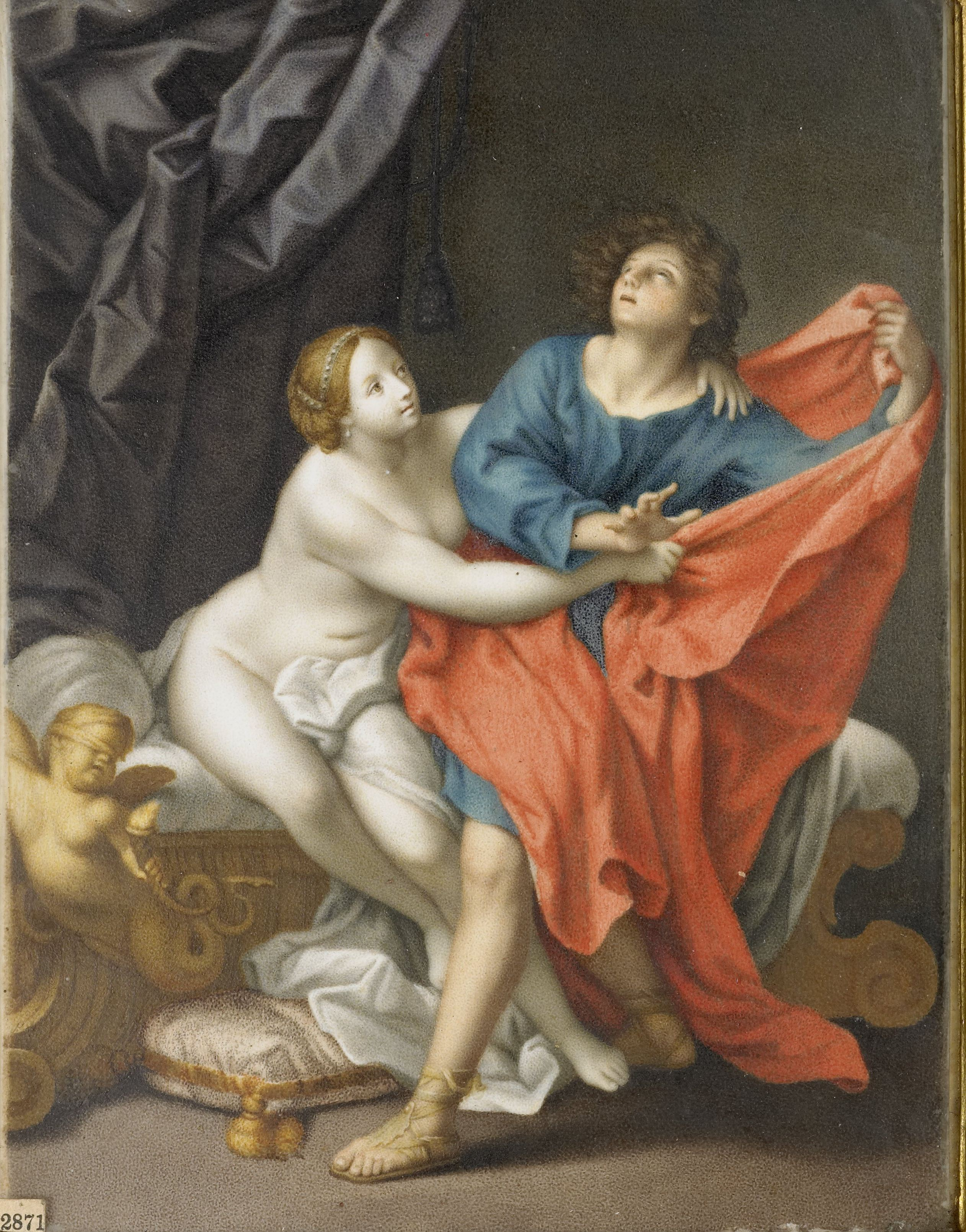 Joseph en de vrouw van Potifar. Jozef rukt zich los uit de omhelzing van de vrouw van Potifar, die naakt op de rand van haar bed zit. Linksonder een geblinddoekte Cupido. Naar een origineel door Carlo Cignani. Onderdeel van de collectie miniaturen.